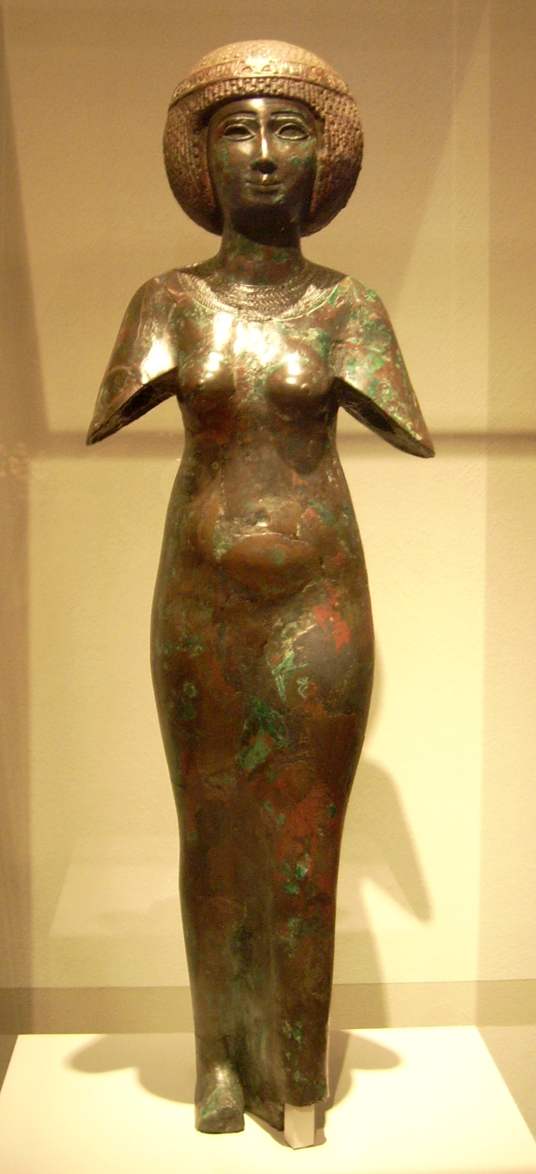 Standfigur des Meres-Amun; 3. Zwischenzeit, 22. Dynastie, um 850 v. Chr.; Bronze; Inv.-Nr. 32321 - Ägyptisches Museum Berlin/Altes Museum